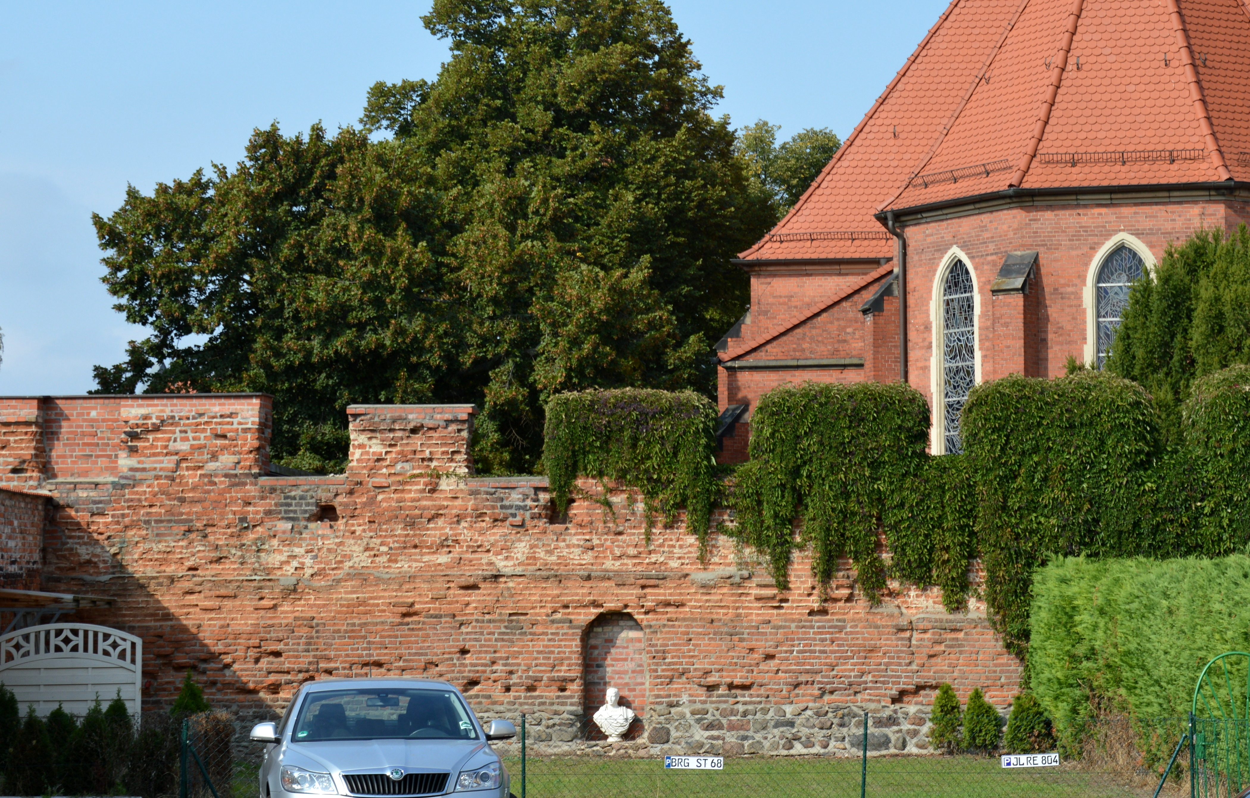 Burg (bei Magdeburg), Blumenthaler Straße, Stadtmauer